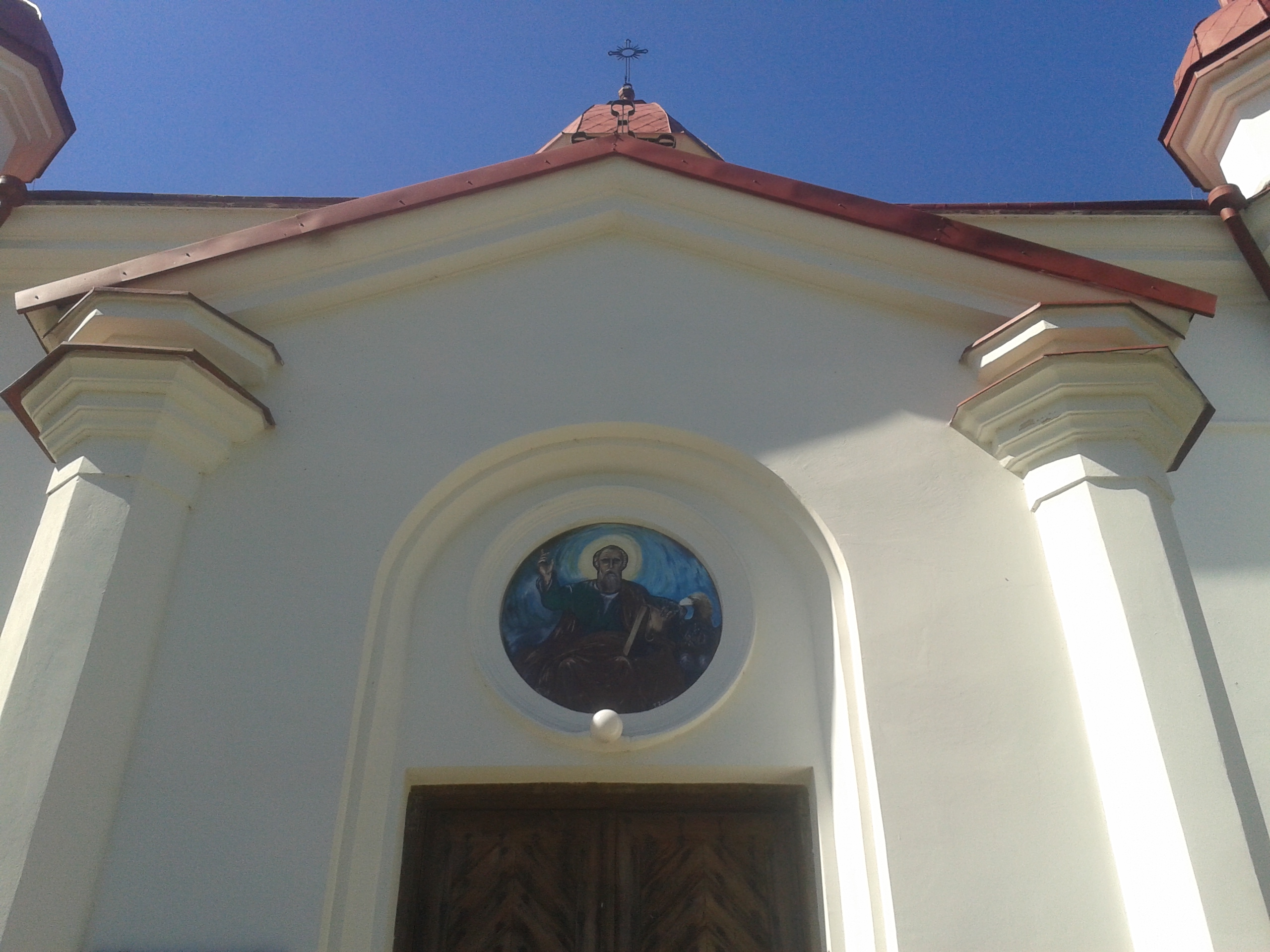 Elewacja dawnej cerkwi, ob. kościoła, w Klonownicy Dużej